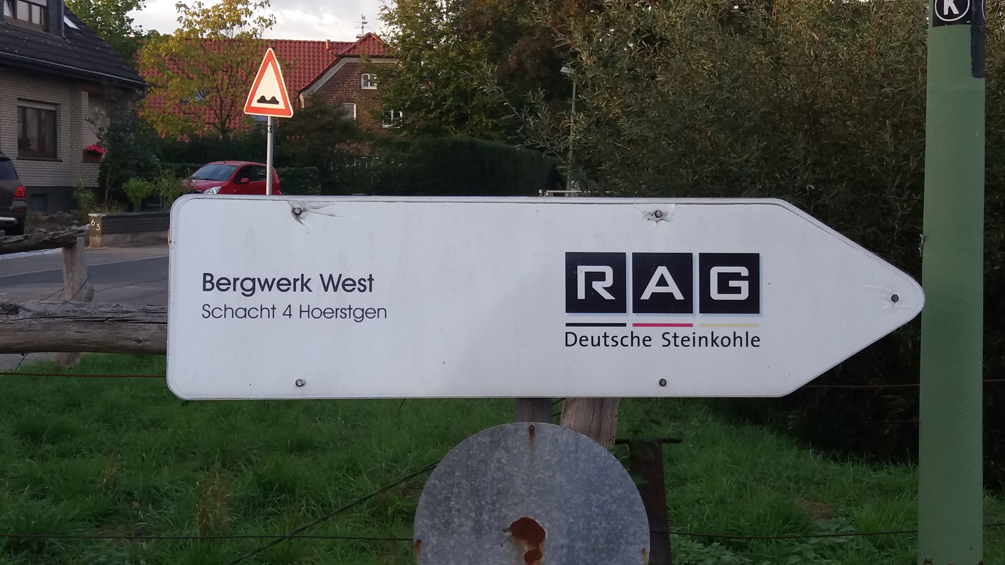 Schild Bergwerk West Schacht 4